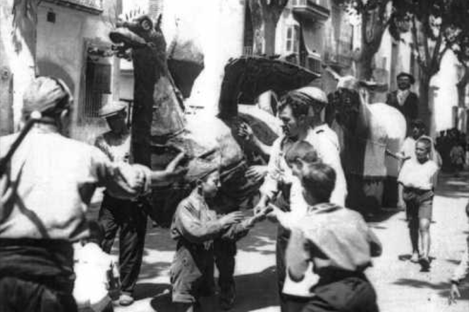 Aquesta fotografia és la segona més antiga que trobem, procedent del fons personal de Joan Amades. Es creu que es la sortida d’Ofici de 1935.